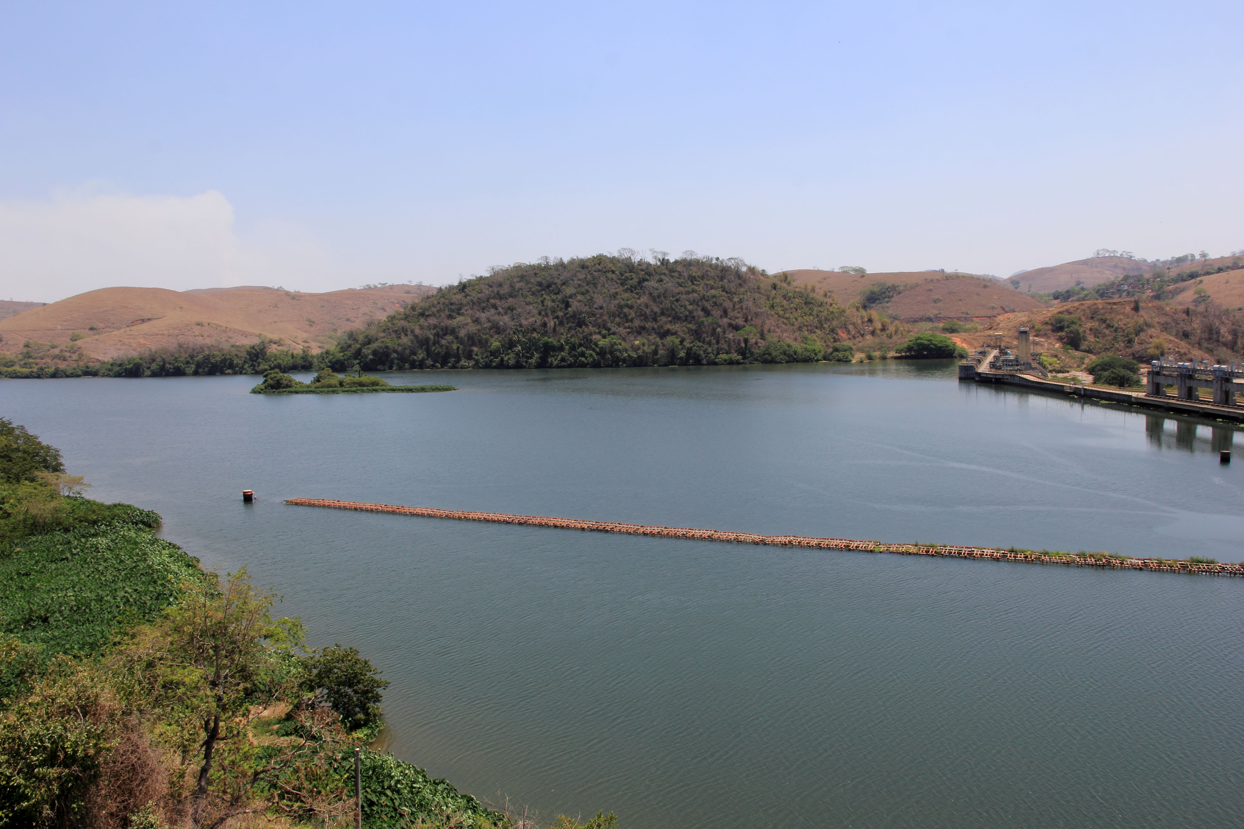 Light - Usina hidrelétrica de Ilha dos Pombos - Rio Paraíba do Sul